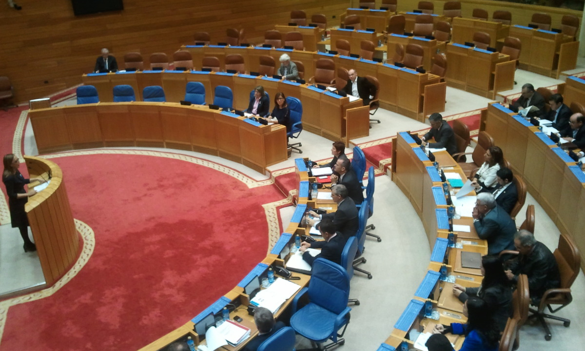 O hemiciclo do Parlamento de Galicia, só co PP e os voceiros da oposición durante unha protesta a comezos do 2013.